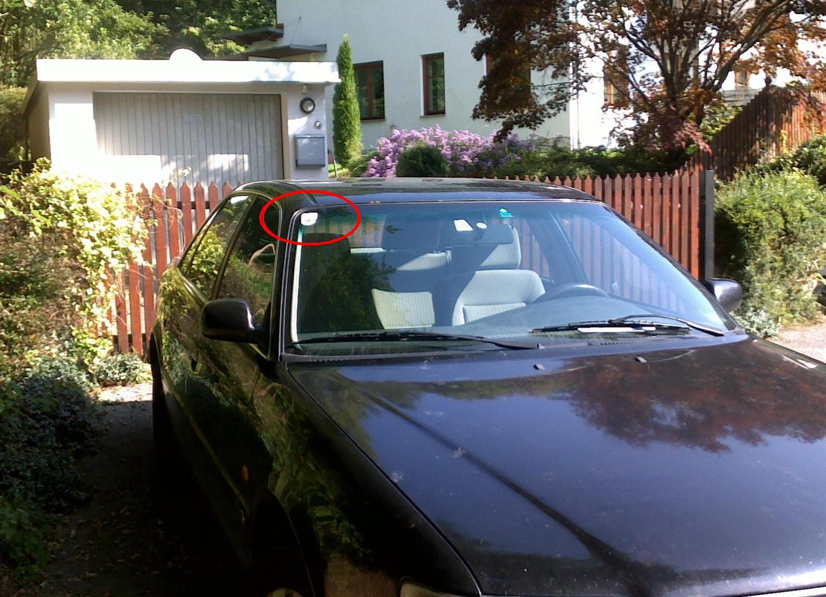 Ort, wo eine Begutachtungsplakette in Österreich an einem PKW platziert sein muss